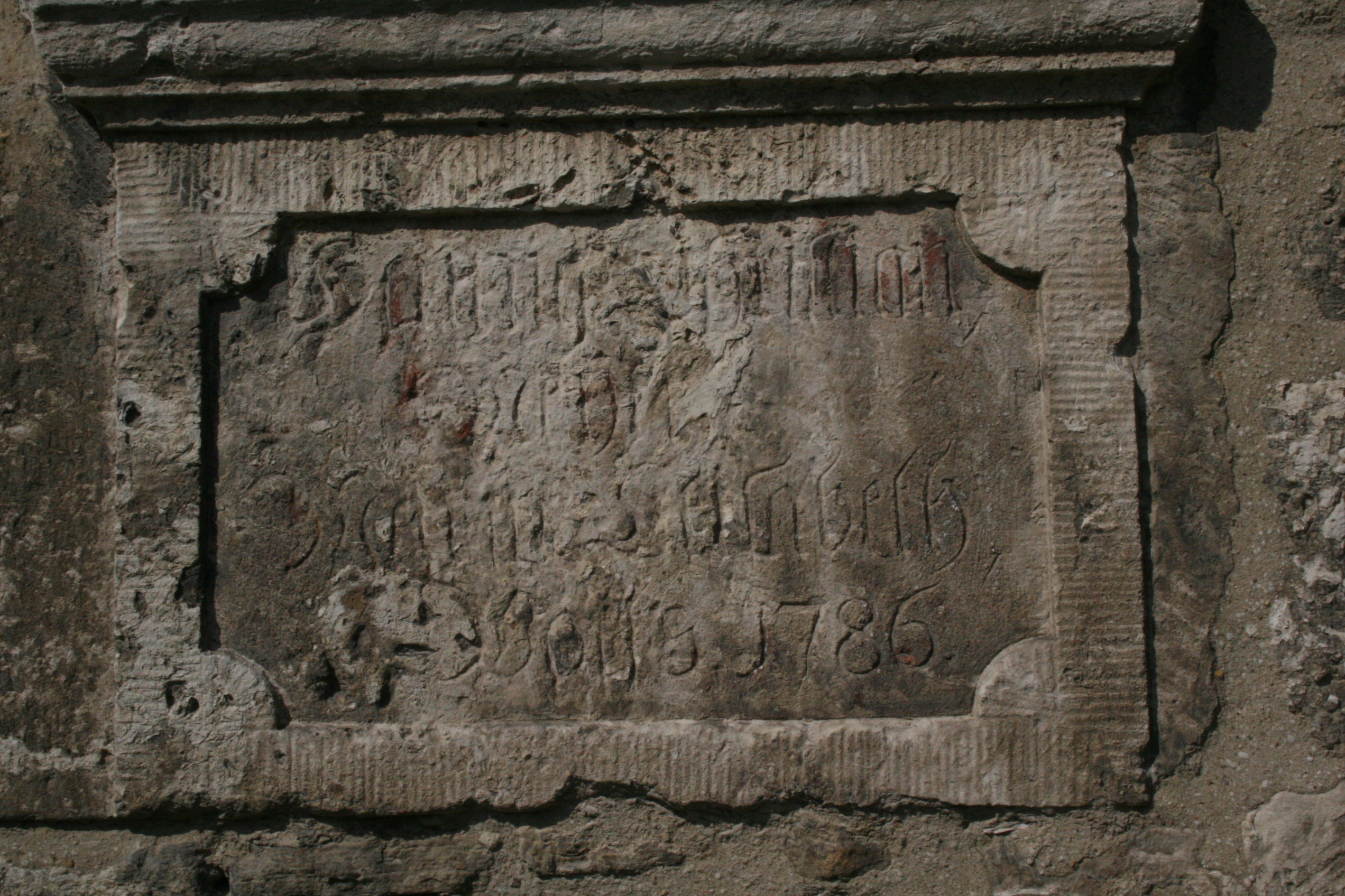 Spolie (?) oder Bausteine der Erbauer in der denkmalgeschützten Scheune in Hachum